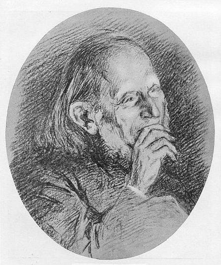 Heinrich Weil, deutscher Altphilologe - german Classical scholar